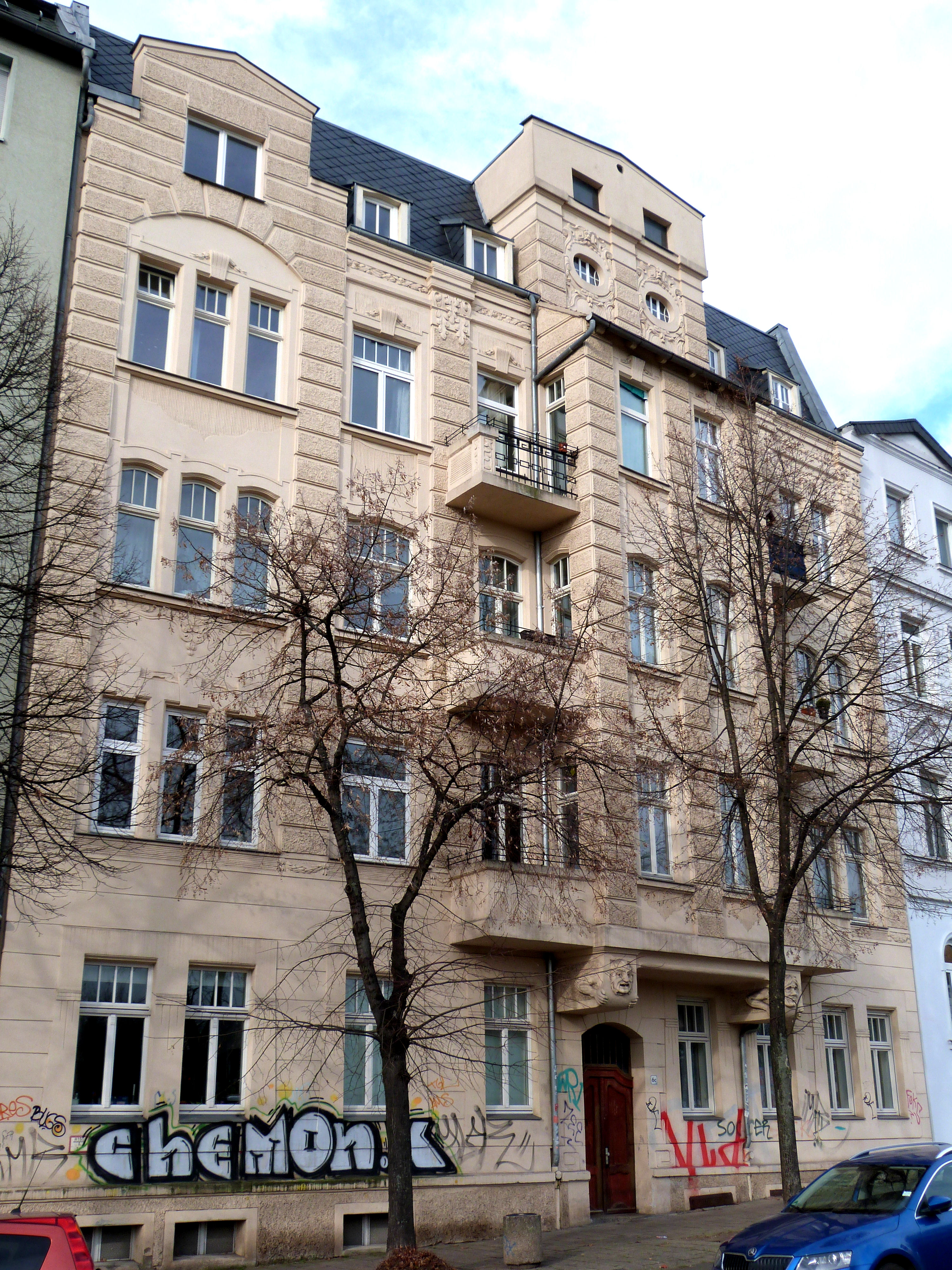 Paracelsusstraße 6c, Halle (Saale)